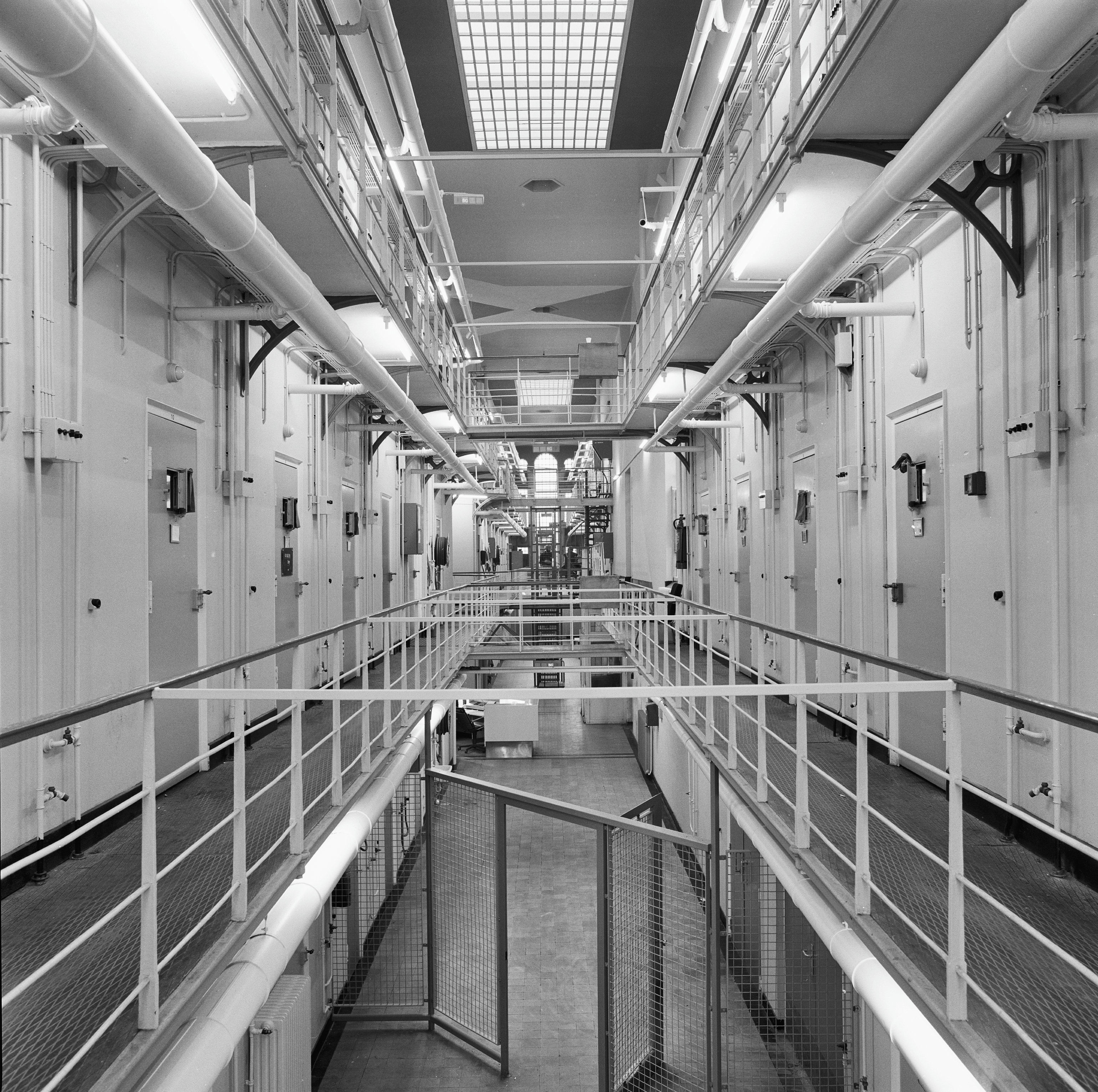 Huis Van Bewaring: Interieur